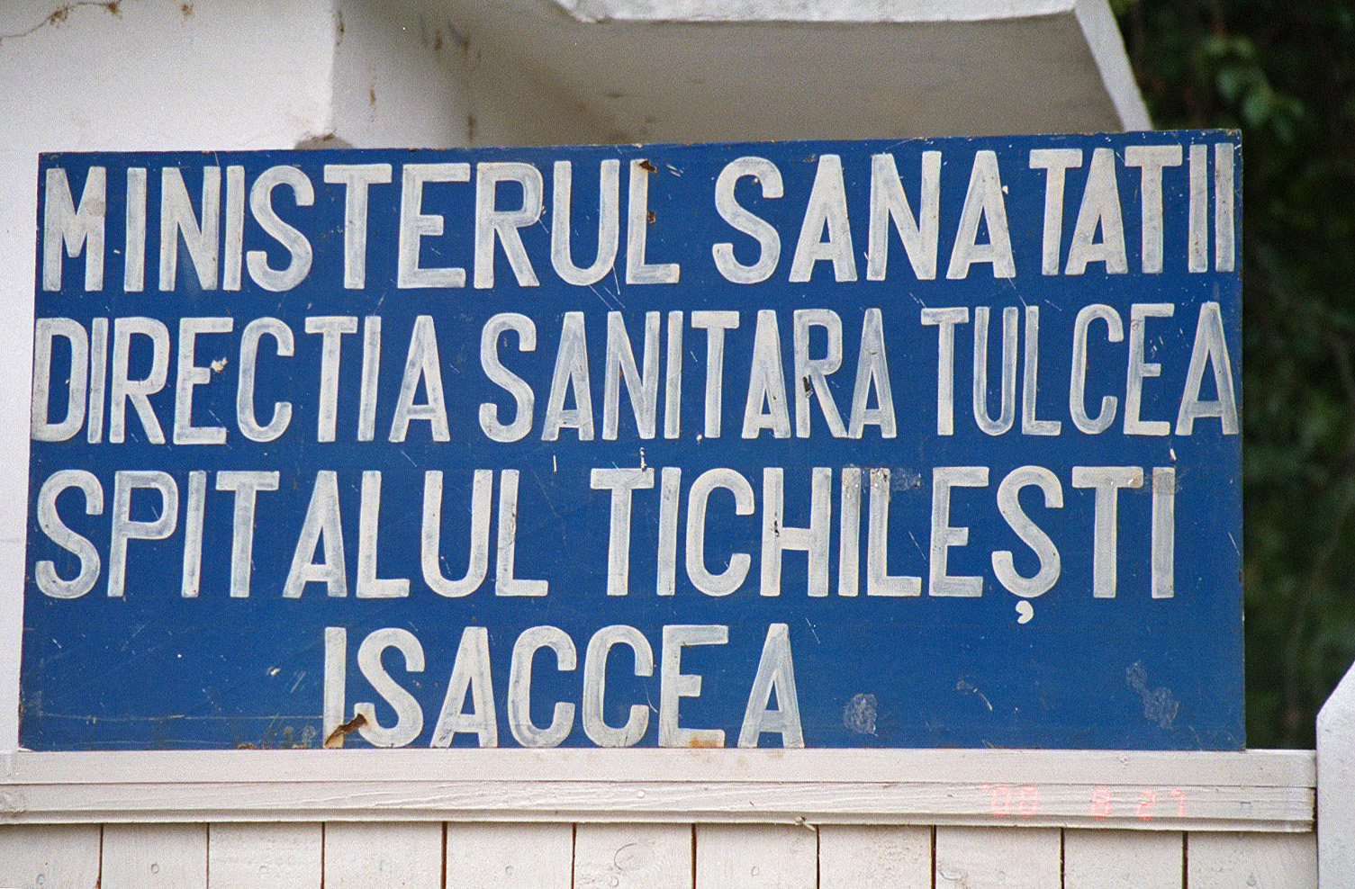 Informationsskylt vid ankomsten till leprakolonin i Tichilesti år 2000